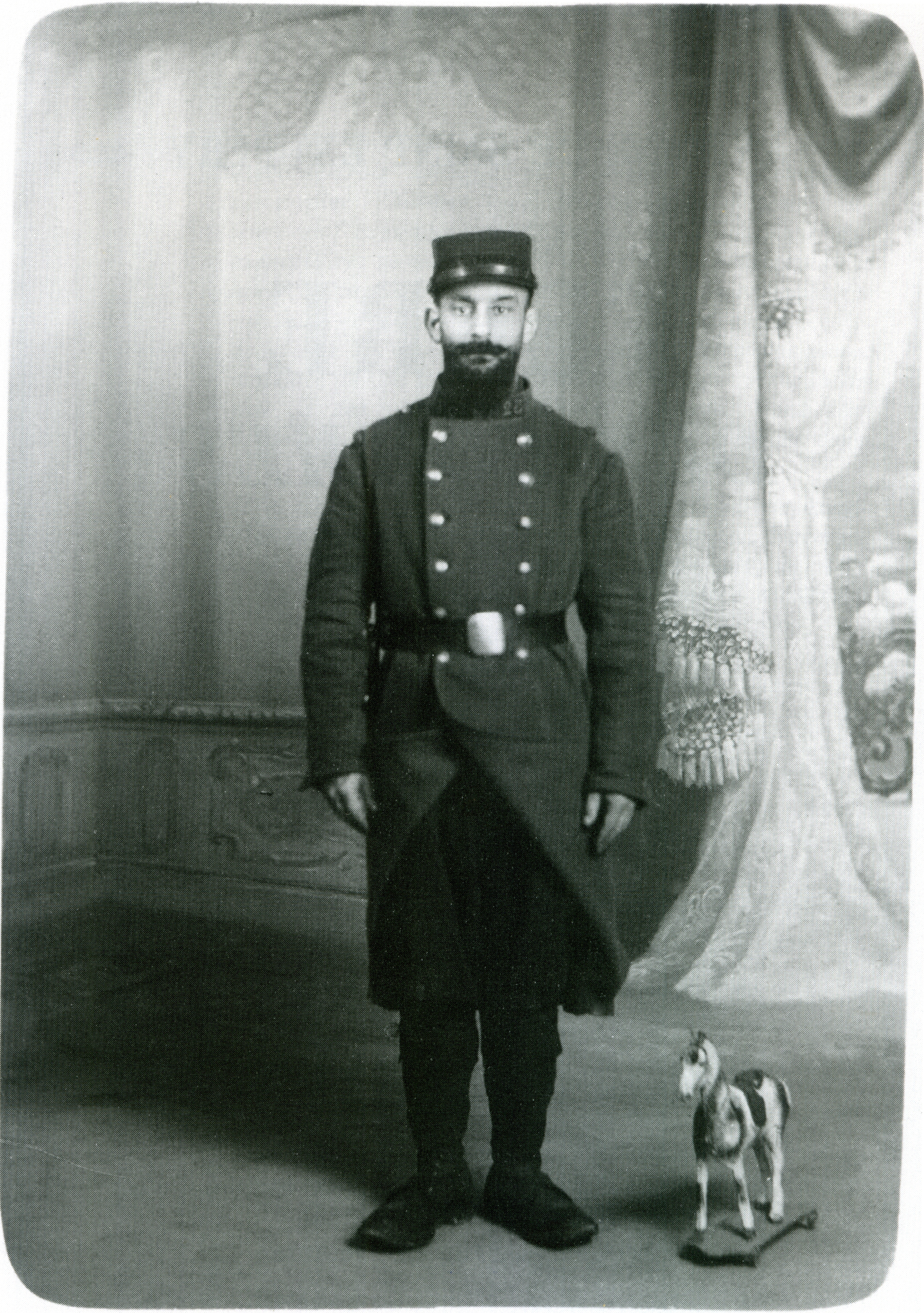 Léon Werth soldat, photographie-carte postale, Montélimar, vers 1900, coll. Claude Werth, Léon Werth a insisté auprès du photographe pour être pris à côté de ce cheval à roulettes.